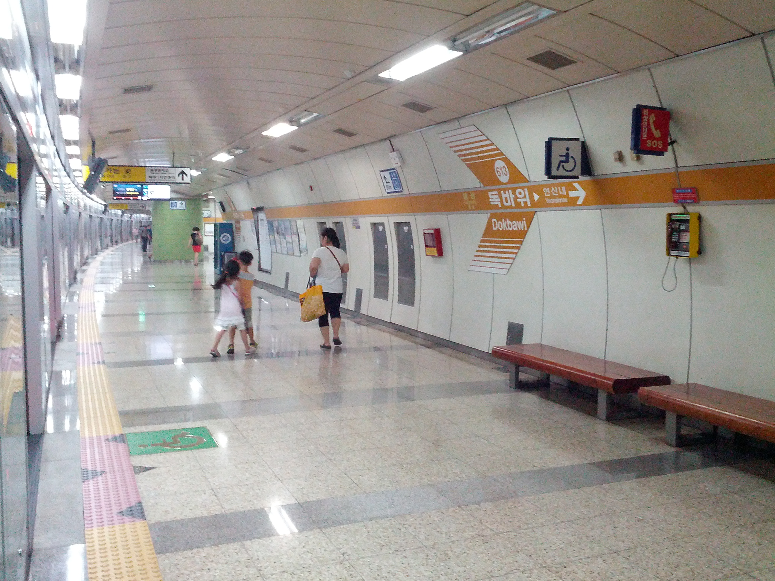 독바위역 승강장